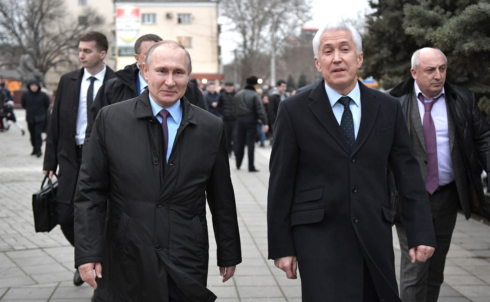 Во время прогулки по Махачкале. C временно исполняющим обязанности главы Республики Дагестан Владимиром Васильевым.